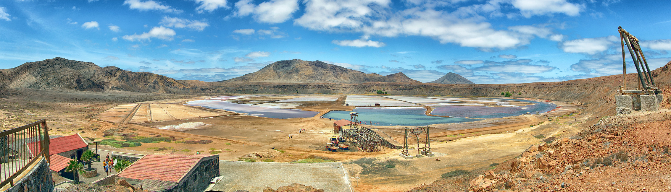 Saline im Krater von Pedra Lume, Sal, Kap Verde, Kapverdische Inseln